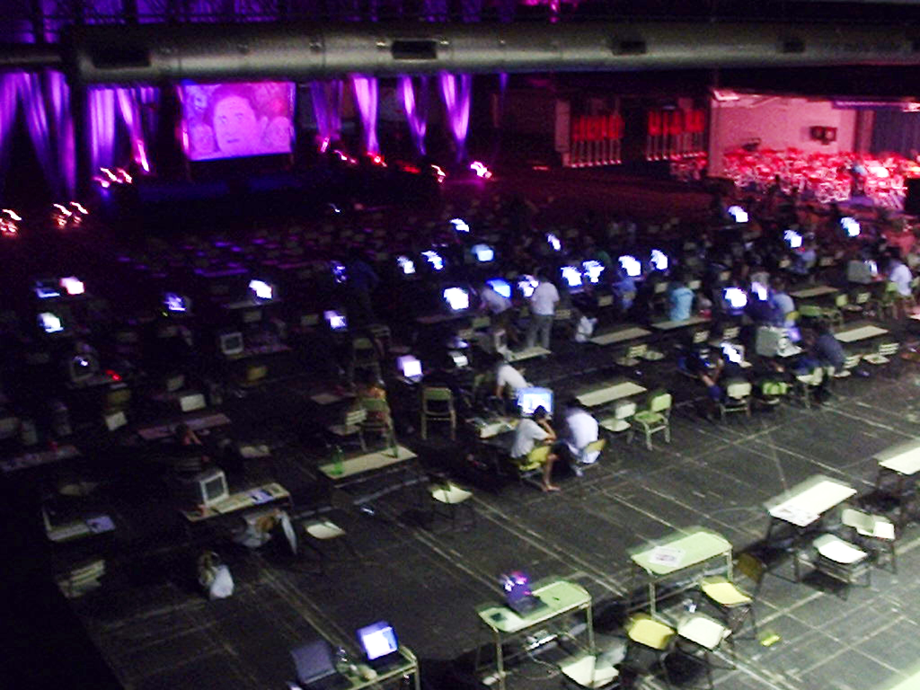 FlashParty 2003, Centro Municipal de Exposiciones, Ciudad Autónoma de Buenos Aires, Argentina